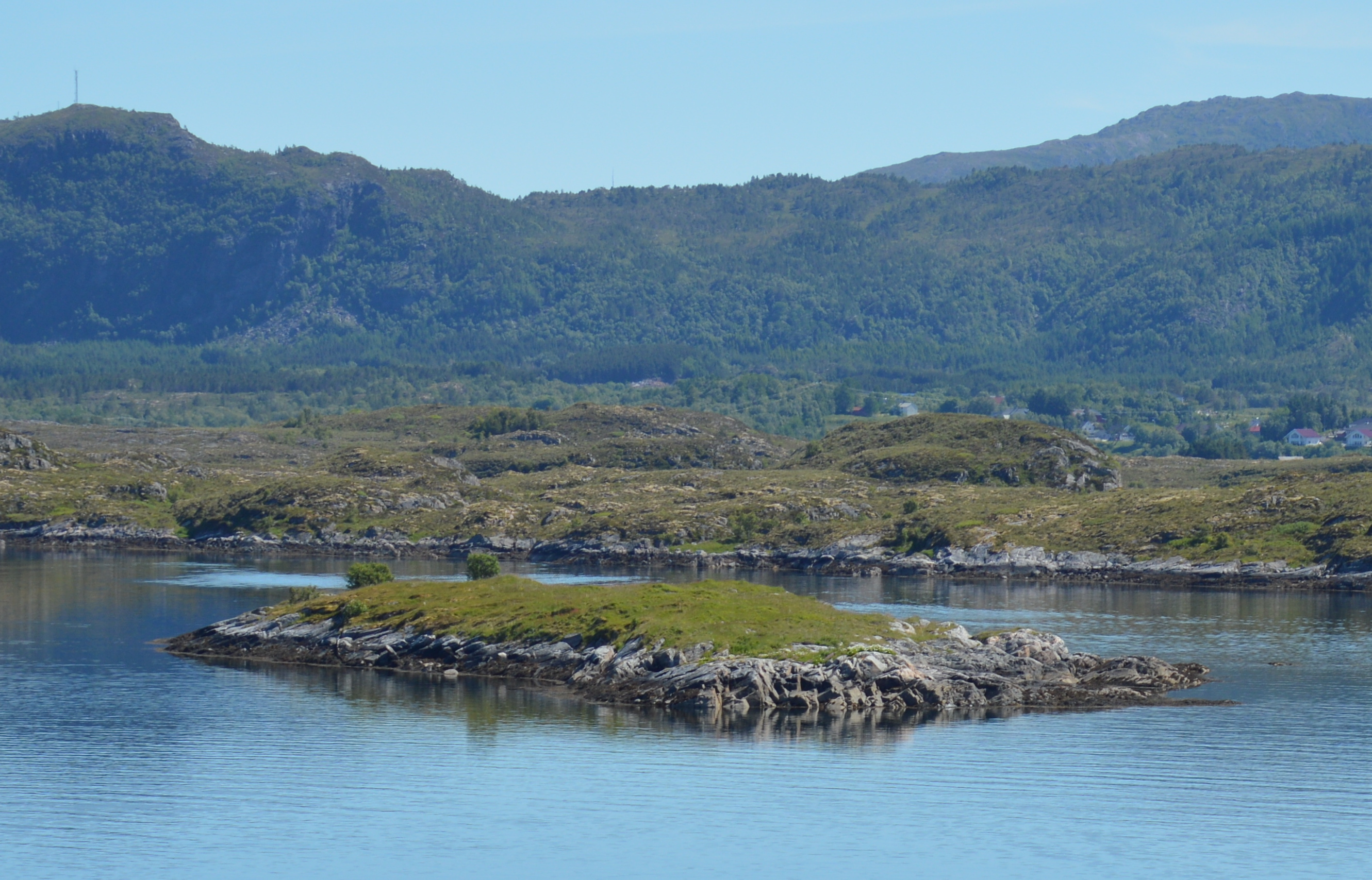 Fånytta